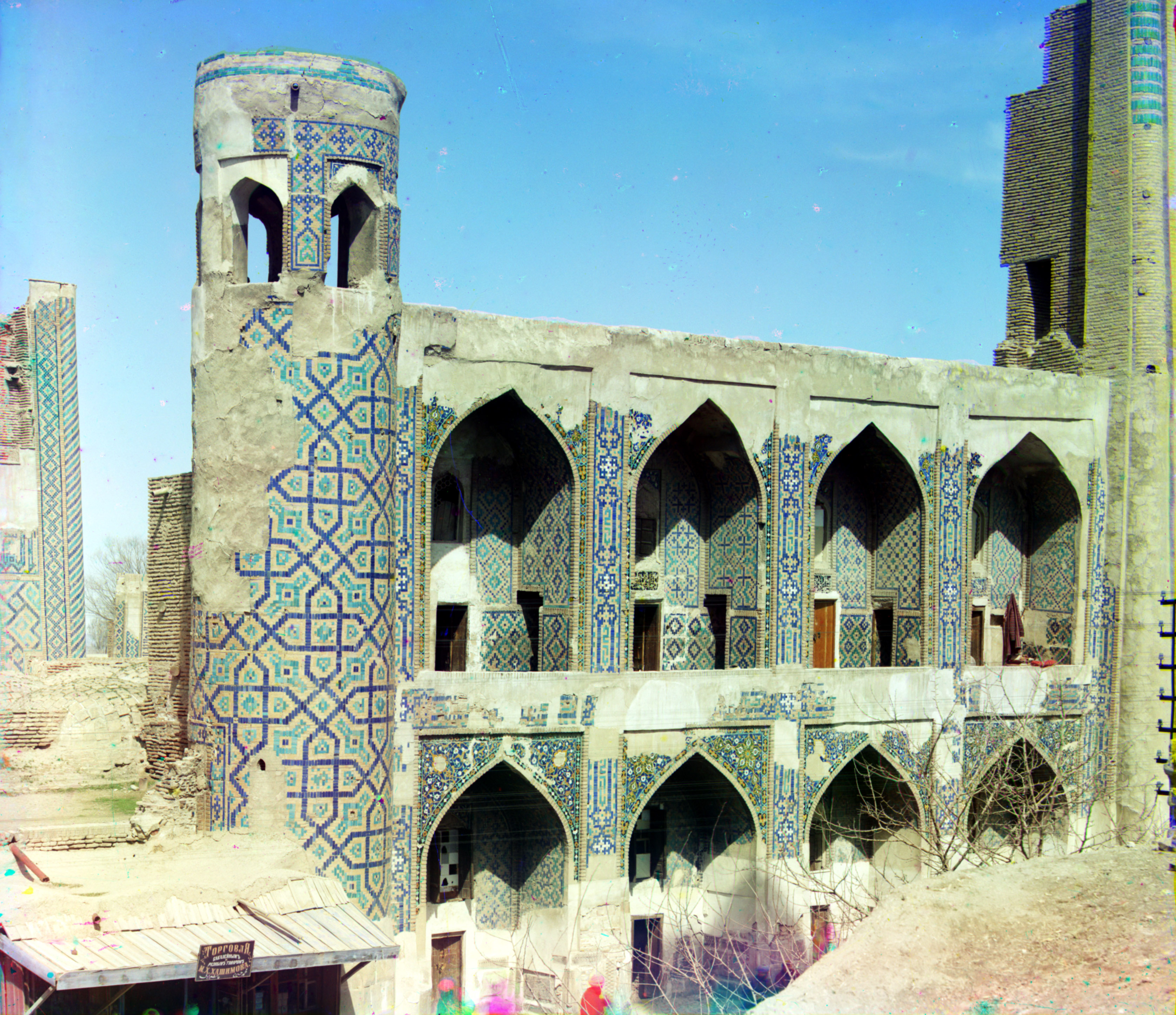 Тилля-Кари с Улуг-Бека. Самарканд